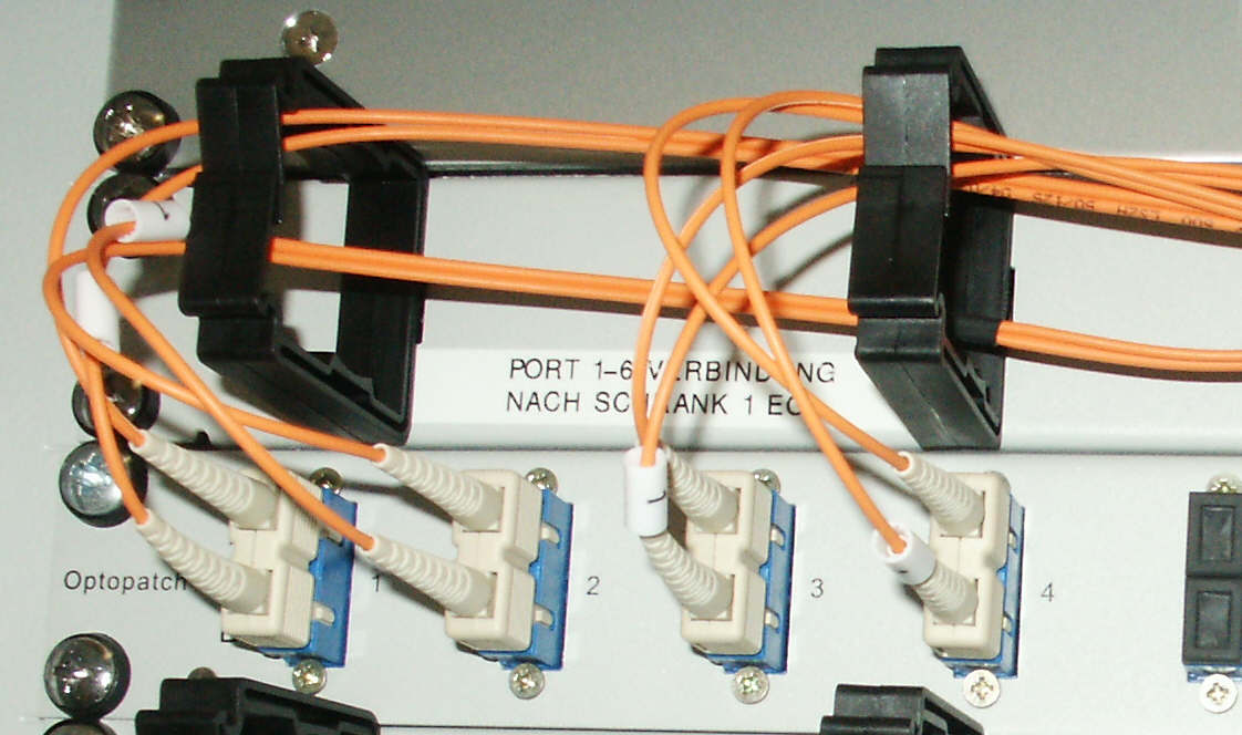 Optopatchfeld mit 50/125µm duplex SC LWL